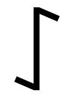 runic letter iwaz